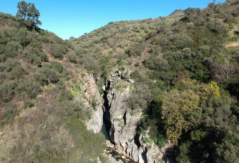 Parte prospiciente all'ingresso delle Gole di Tiberio, con vista del fiume Pollina, immortalata dall'alto (dal versante Sud).